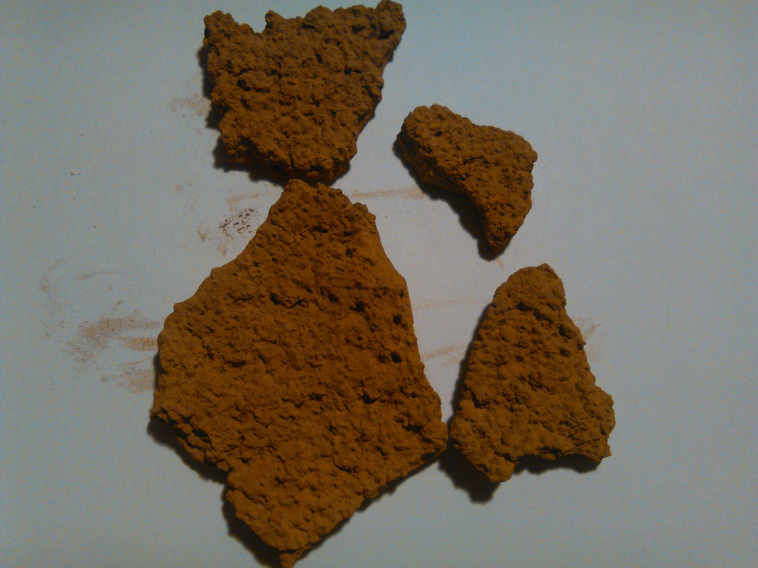 Crostes de schwertmannita obtingudes de zona de drenatge àcid de mines, Corta Atalaya, Huelva, Andalusia